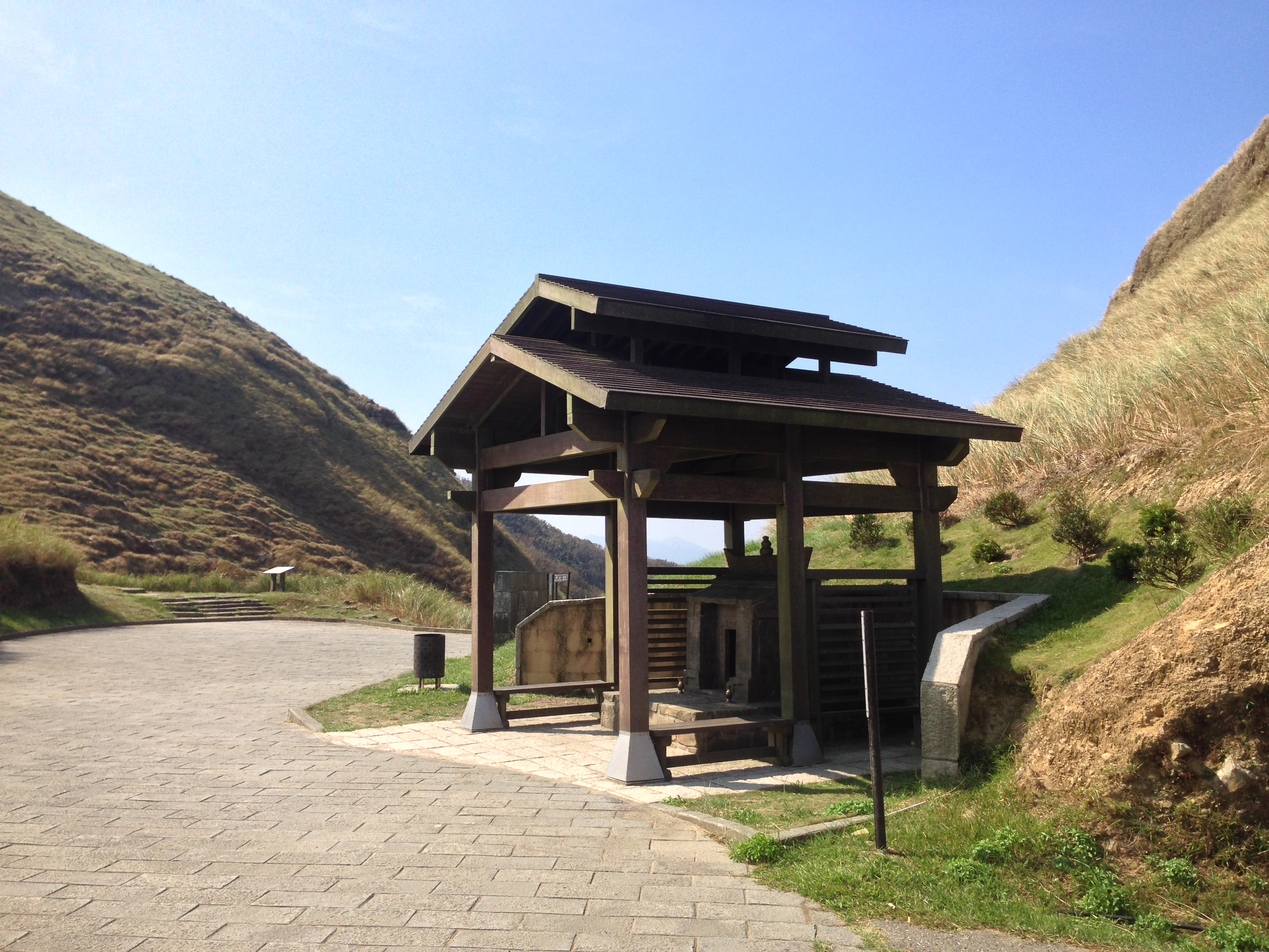 魷魚公廟與草嶺古道埡口